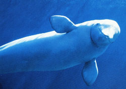 Belugawhale (Delphinapterus leucas)